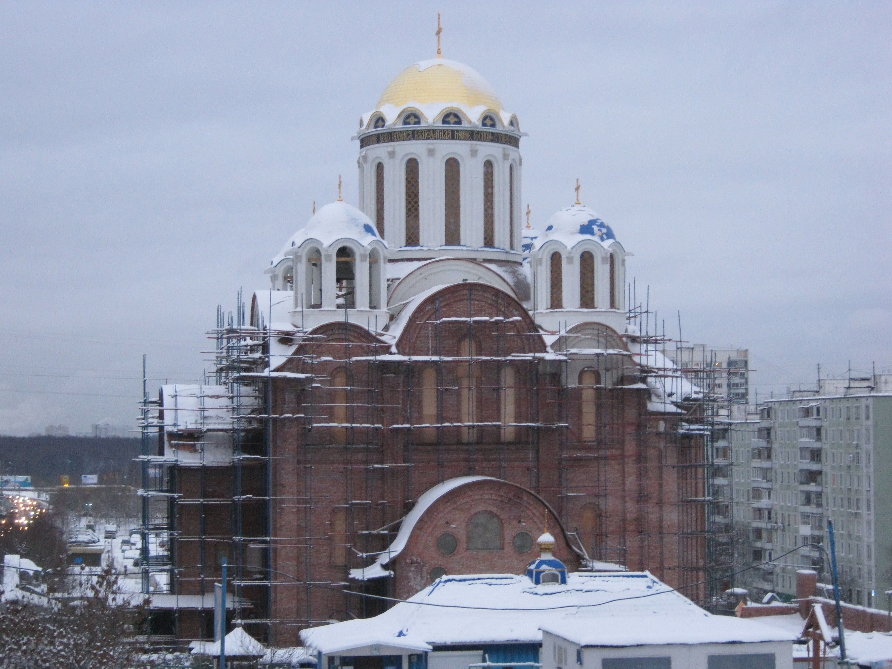 Вид на храм Покрова Пресвятой Богородицы от бывшего кинотеатра Ханой